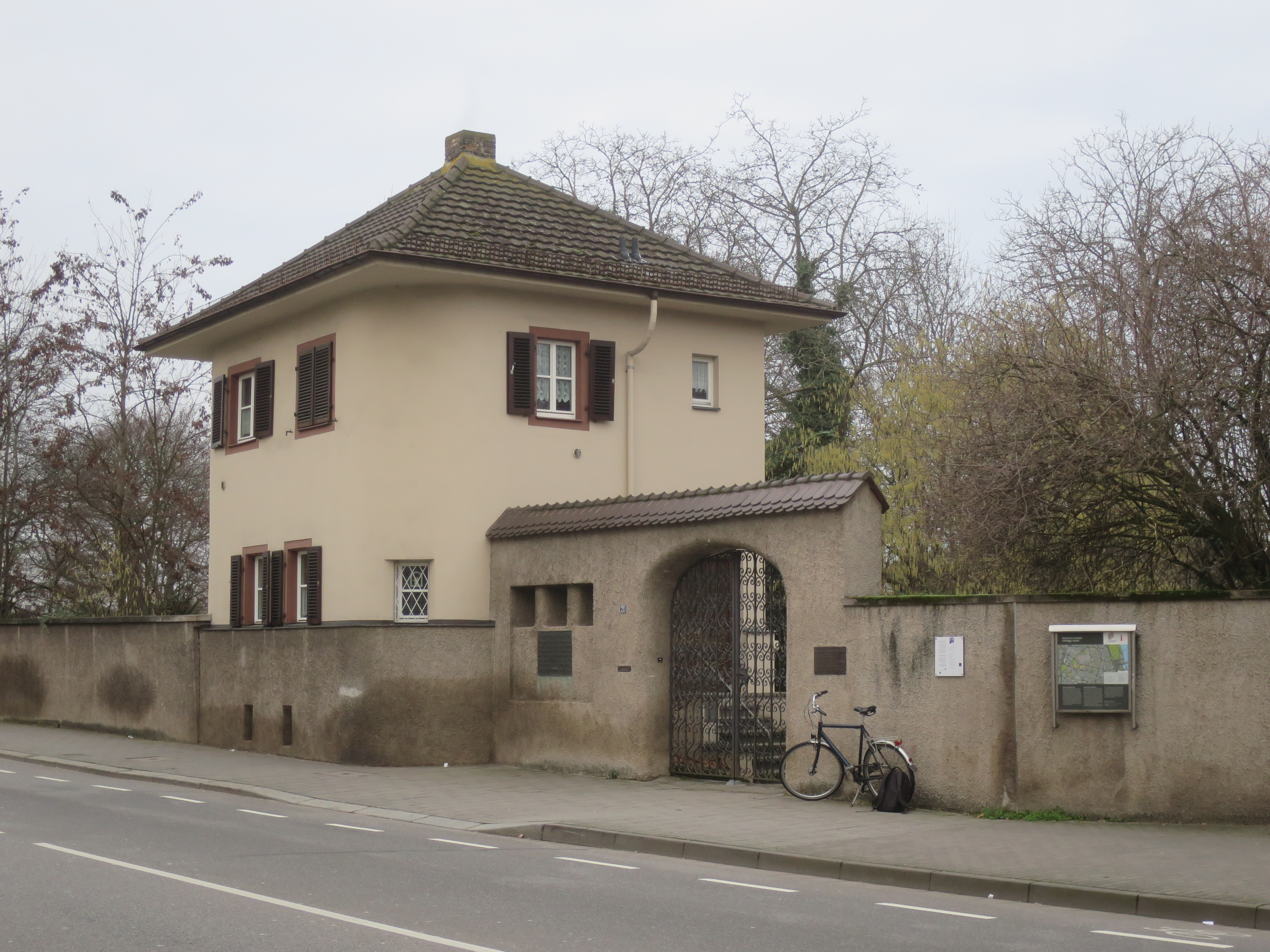 Pförtnerhaus, Heiliger Sand, Worms